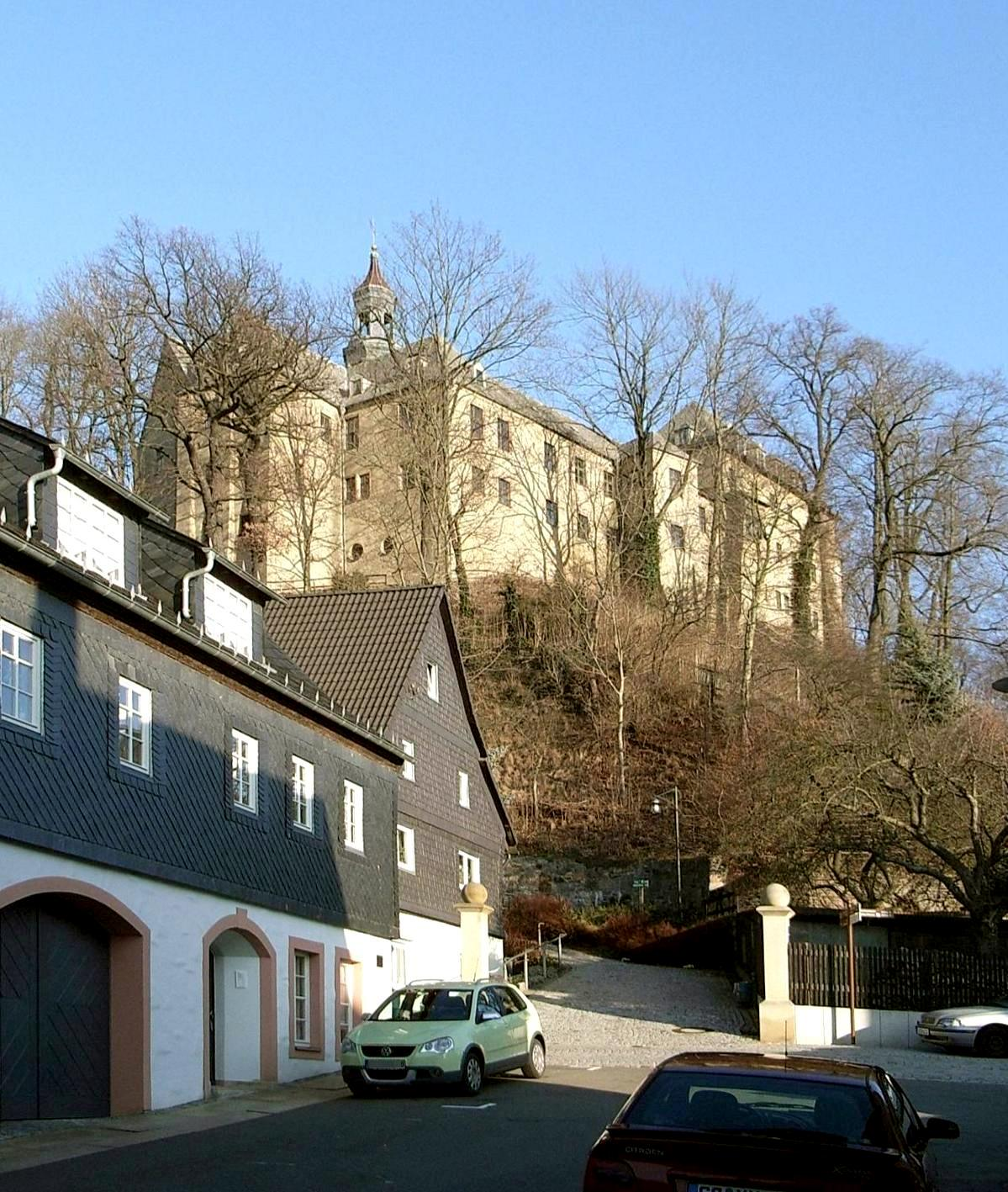 Blick zum Schloss vom Schlossbergaufstieg